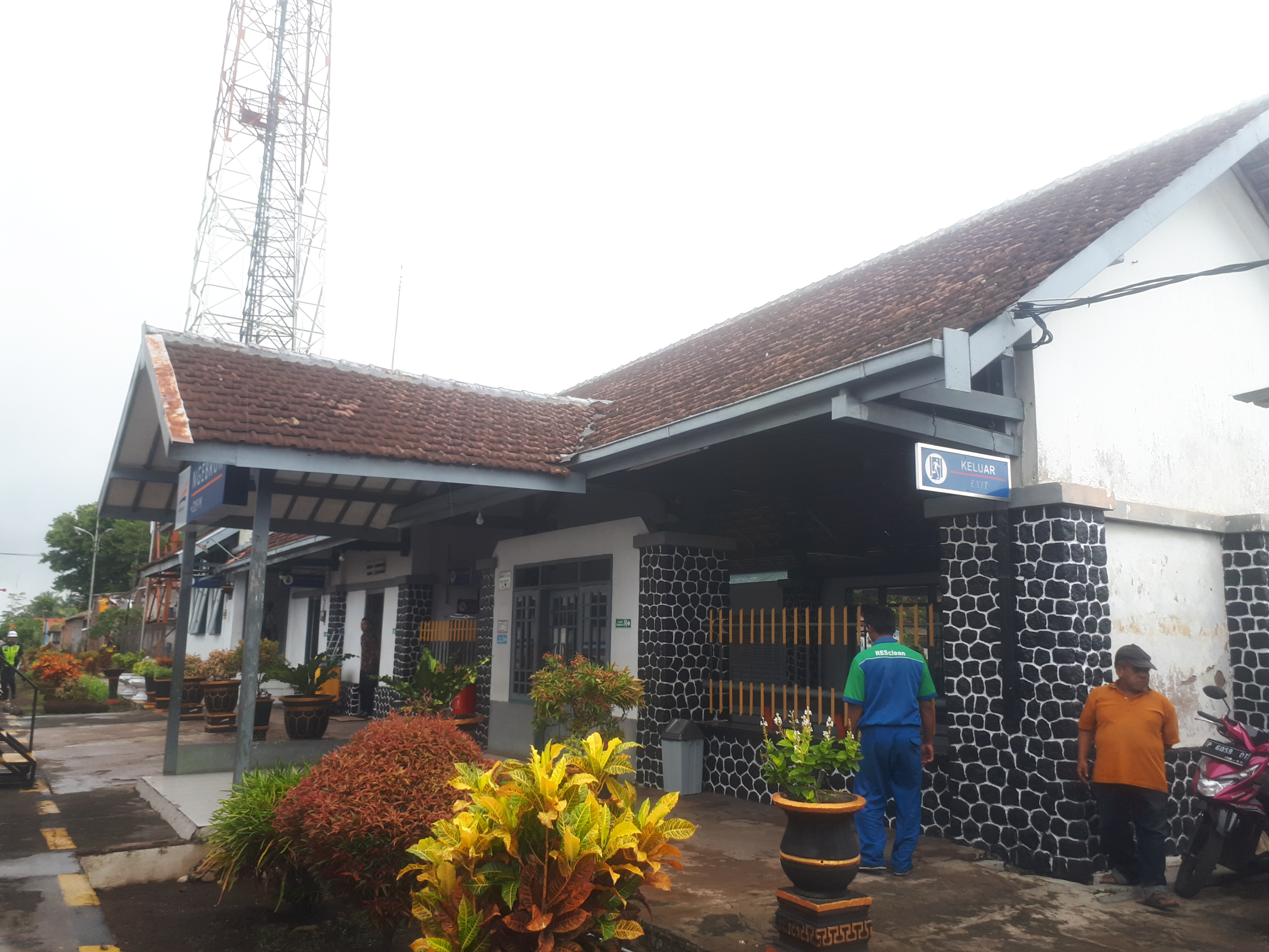 Stasiun Ngebruk pada tahun 2020